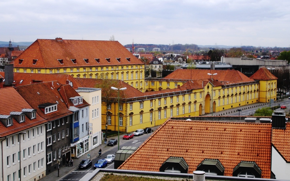 Das Osnabrücker Schloß in der Neustadt. Ernst-August I. hat es bauen lassen. Ein echter Aufsteiger aus der Welfendynastie. Hier noch mehr zur Geschichte der Residenz.